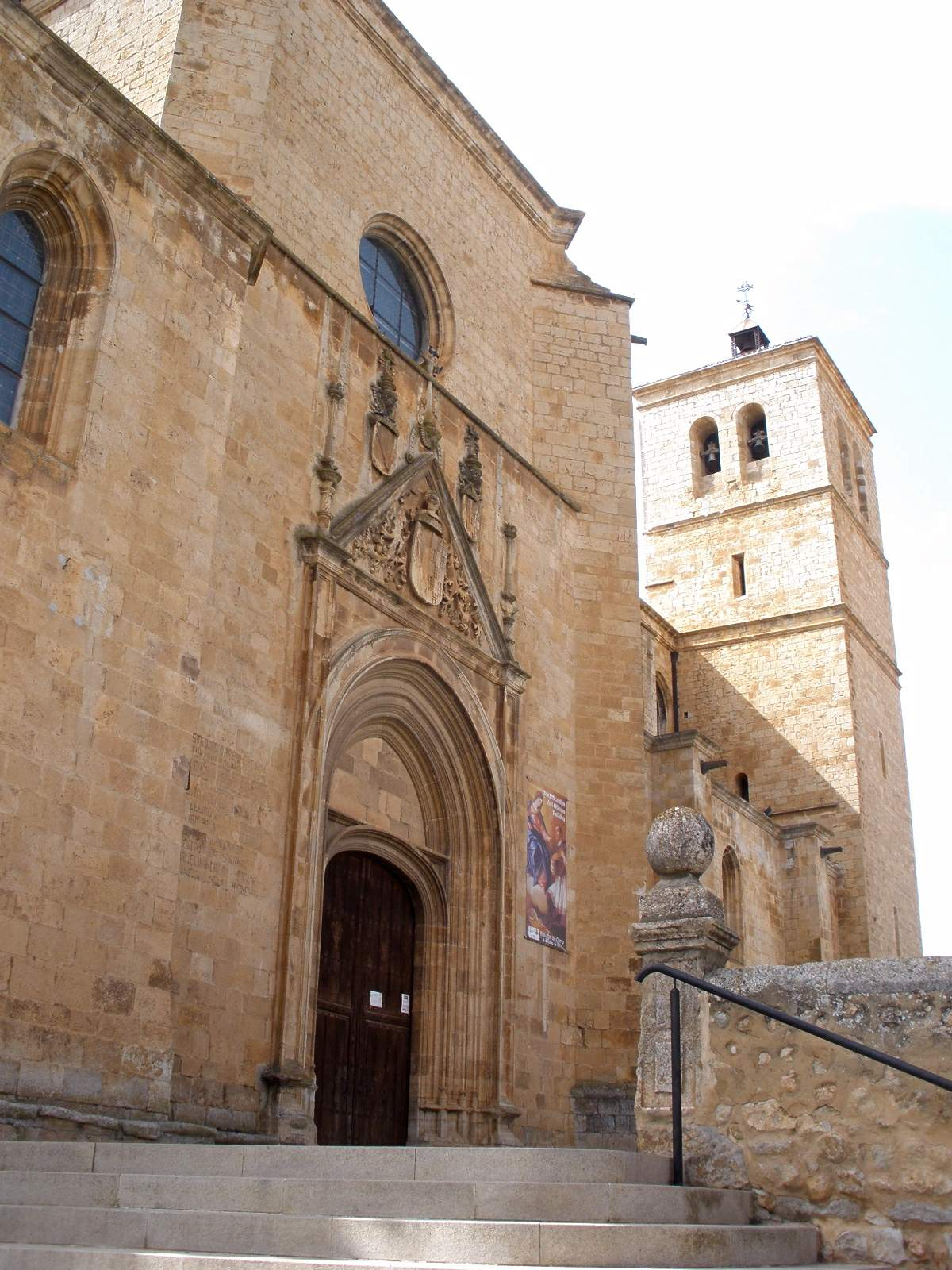 Berlanga de Duero (Soria) - Colegiata de Santa Maria del Mercado